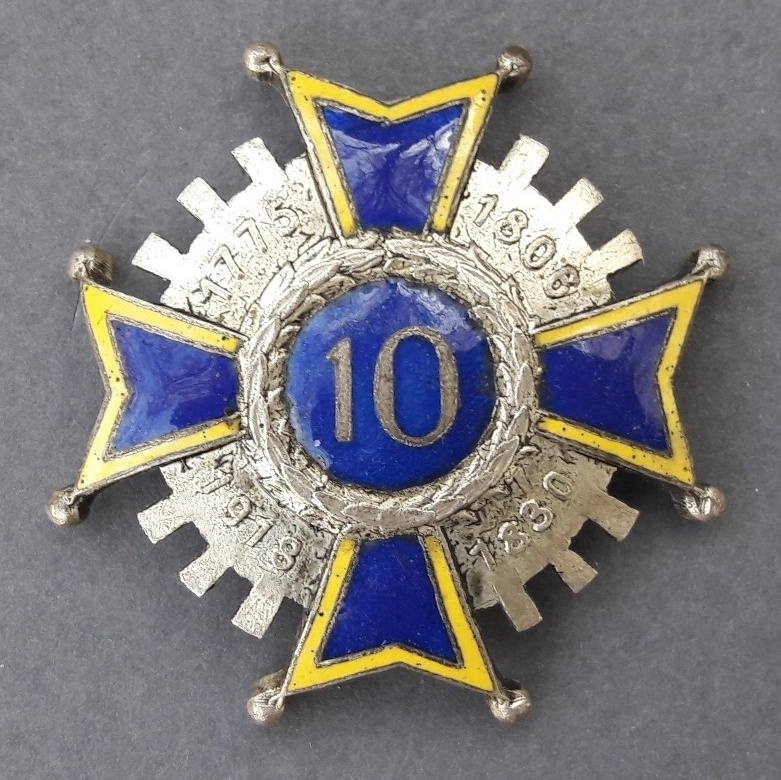 Odznaka oficerska 10 pułku piechoty (II RP) - replika